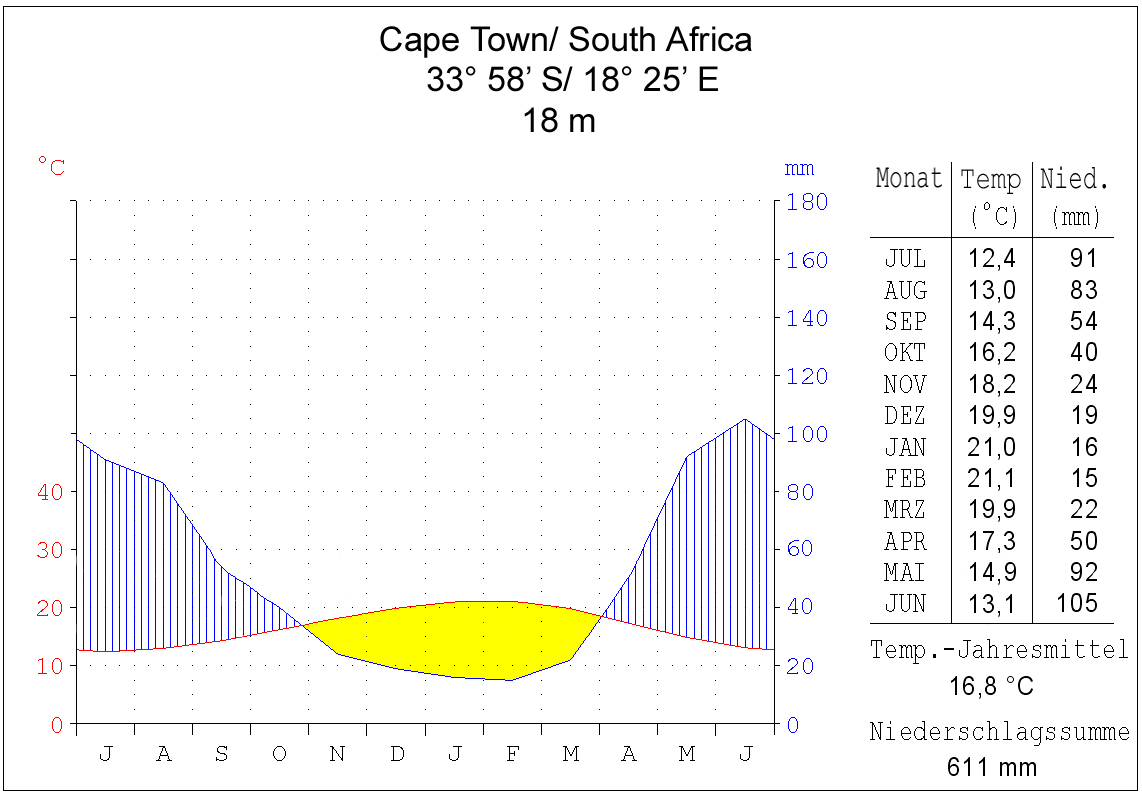 Summary Beschreibung: Klimadiagramm Kapstadt selbst erstellt am 28.01.2006 Licensing